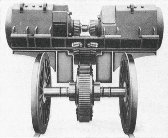 SLM-Universalantrieb: Anordnung der zwei Motoren